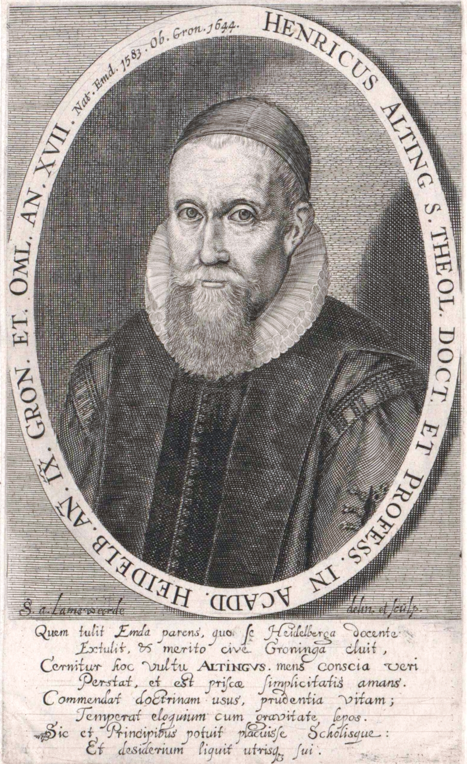 Johann Heinrich Alting (1583–1644)